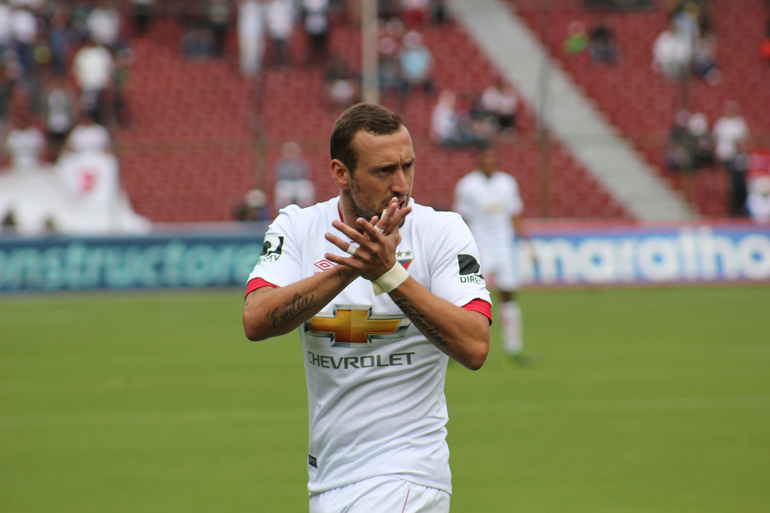 Brahian Alemán en un partido con LDU